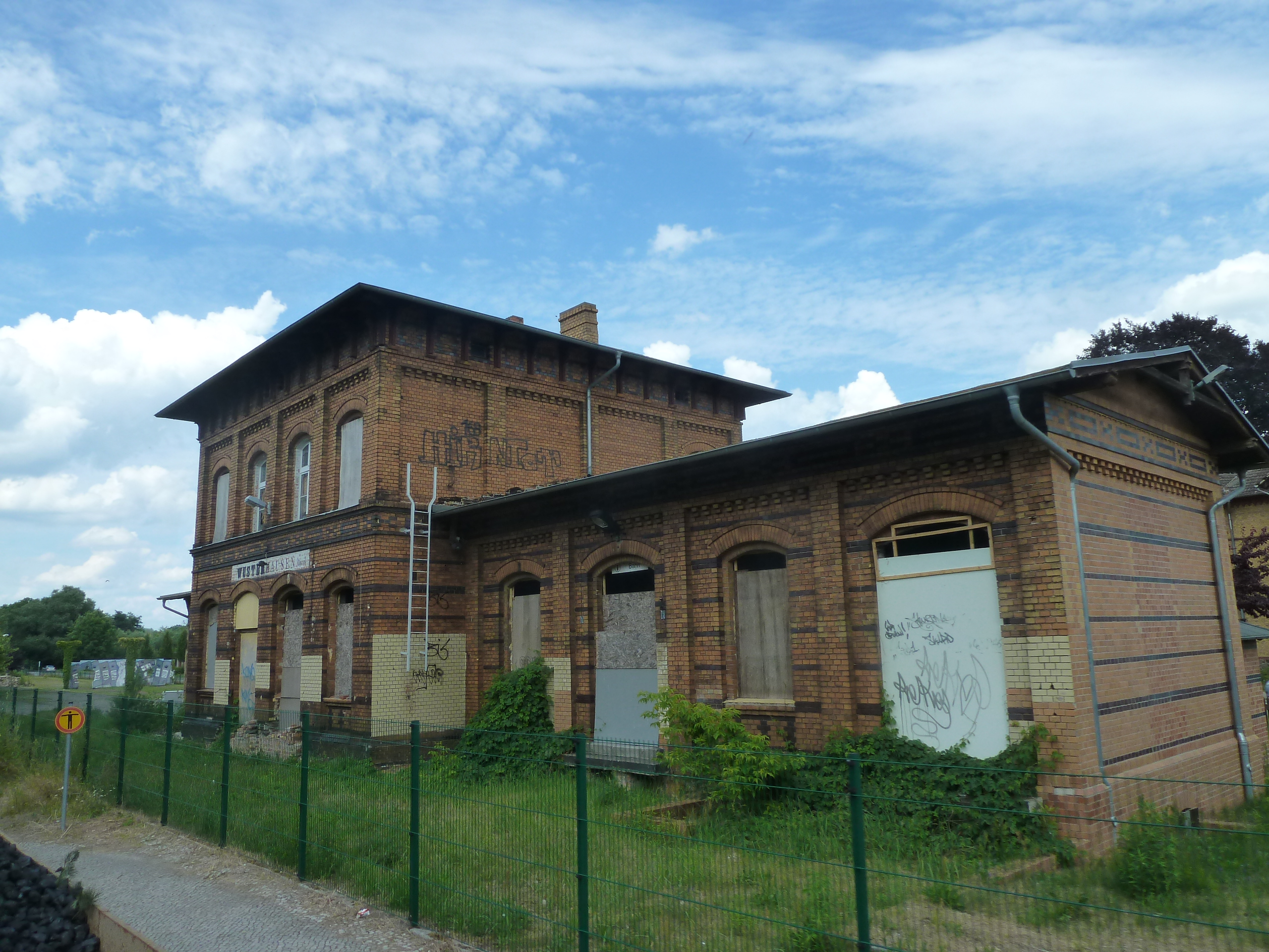 Bahnhof Wusterhausen (Dosse), Baudenkmal, Gleisseite